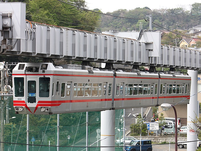 Monorail Shōnan de la série 500